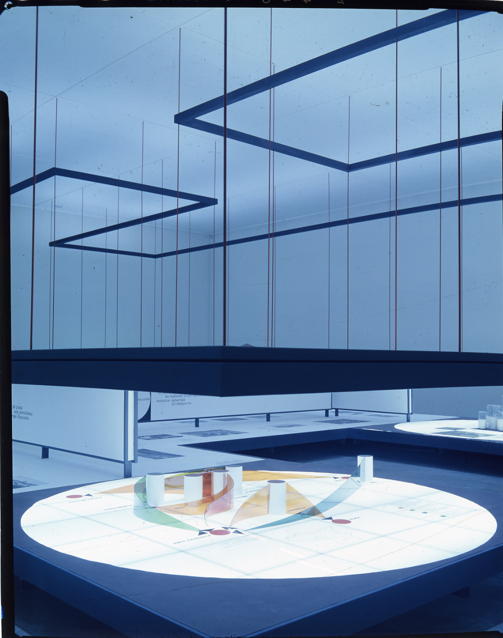 Servizio fotografico : Bolzano, 1957 / Paolo Monti. - Buste: 13, Fototipi: 13 : Diapositiva, sviluppo cromogeno/ pellicola ; 10x12. - ((Serie costituita da 13 buste sciolte di negativi colore identificati con i nn.: 709, 710, 711, 712, 713, 714, 715, 716, 717, 718, 719, 720, 721. - Sulla busta identificata con il n. 709 iscrizione didascalica manoscritta a penna. - Fonte: Rubrica di Paolo Monti: Archivio 10x12 (ultimi numerati) - dal G1 al (s.d.), presso Archivio Paolo Monti